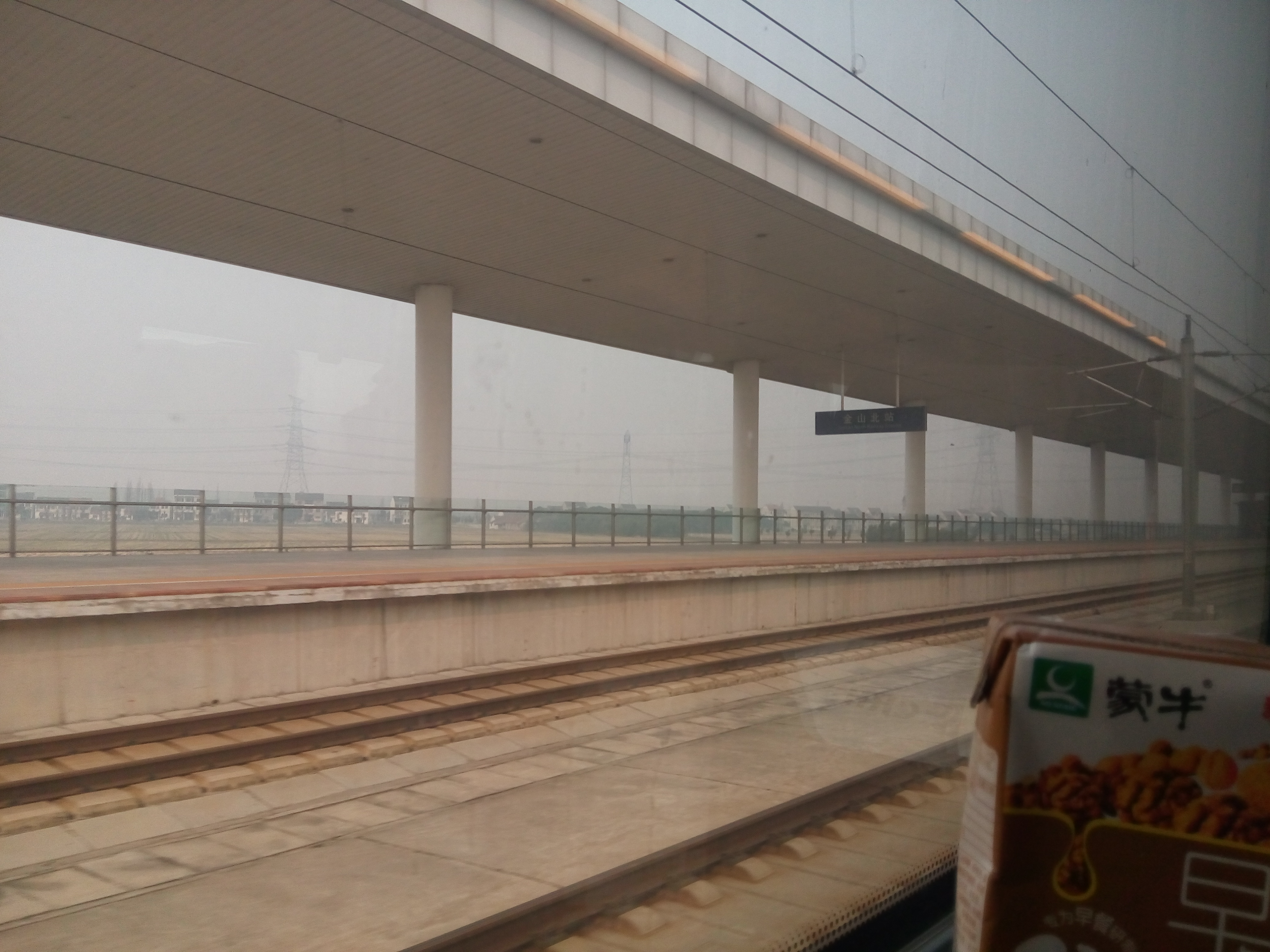 金山北的北侧站台